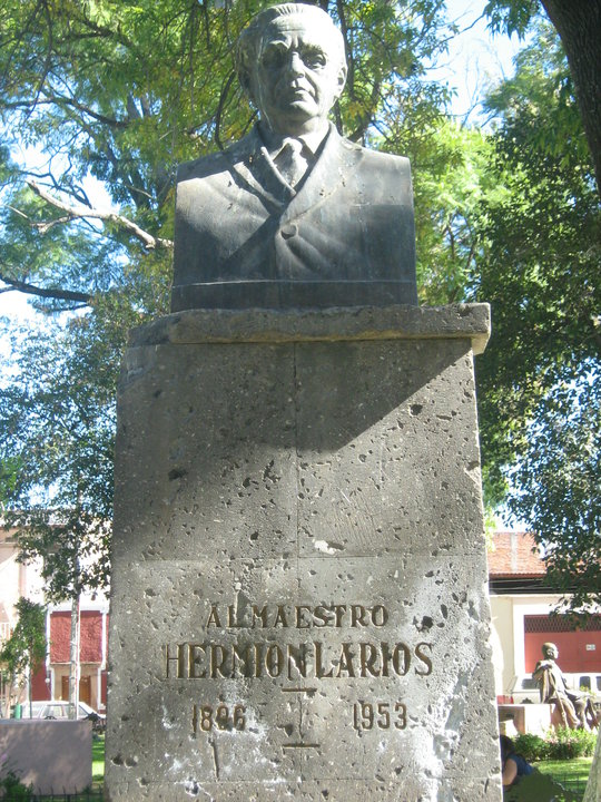 El Busto de Hermión Larios Torres en Lagos de Moreno